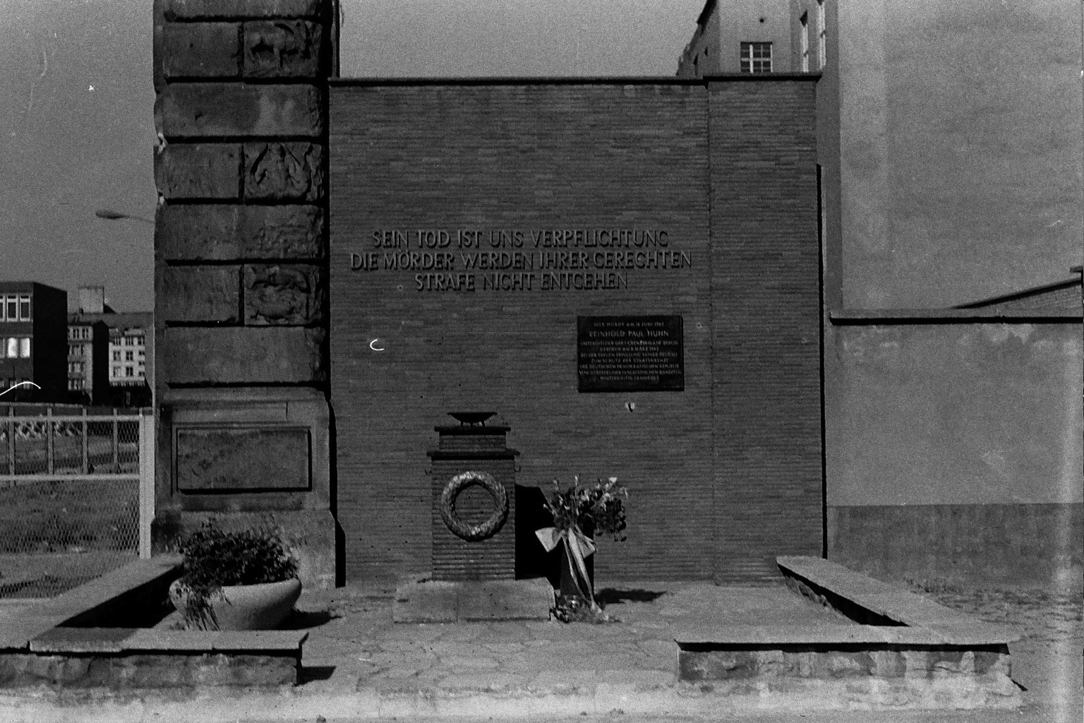 Urheberrecht D.Hubert Peuker